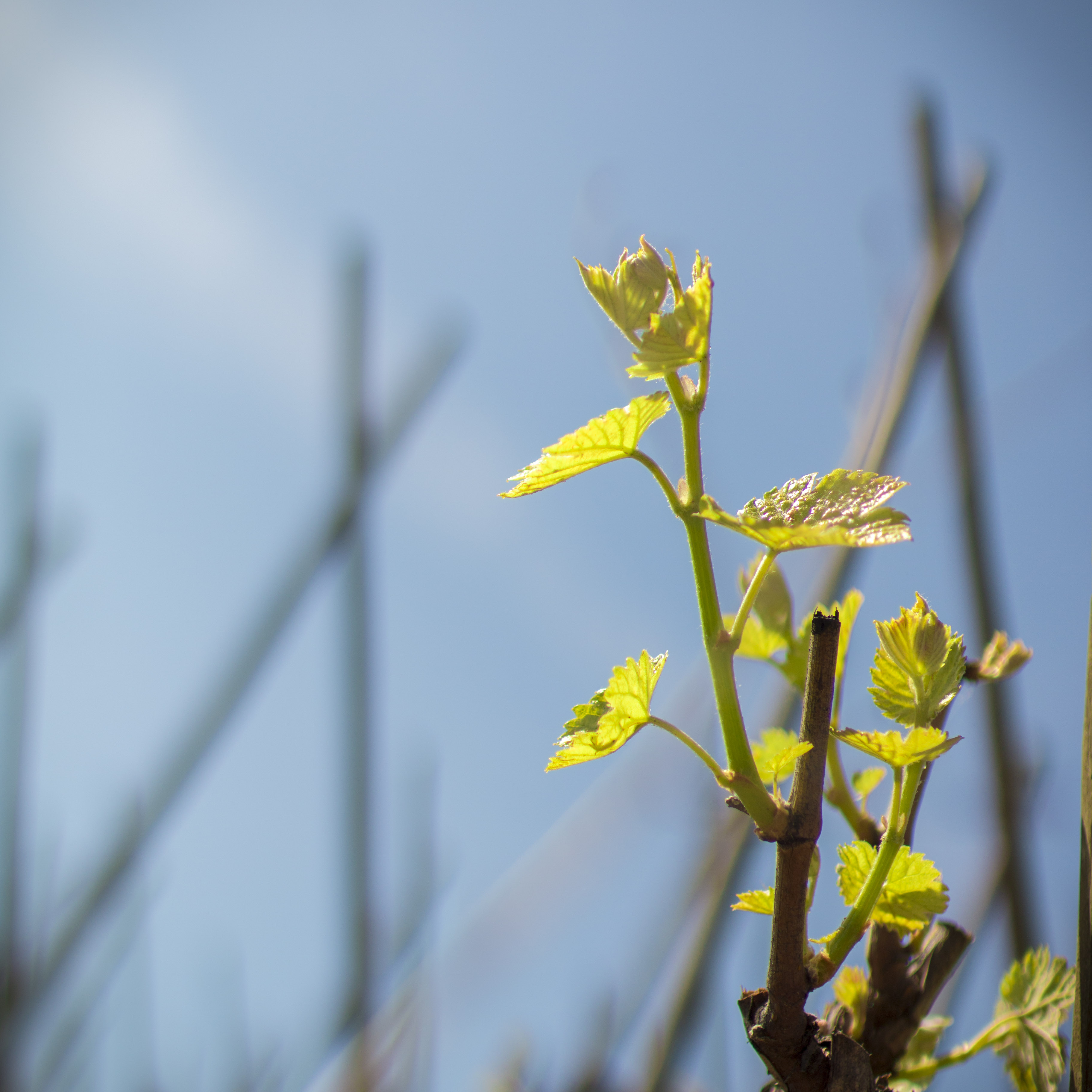 Stade Baggiolini : E, Stade Eichhorn & Lorenz : 09, Stade BBCH : 13, Stade de la vigne : Troisième feuille étalée, entièrement dépliée.